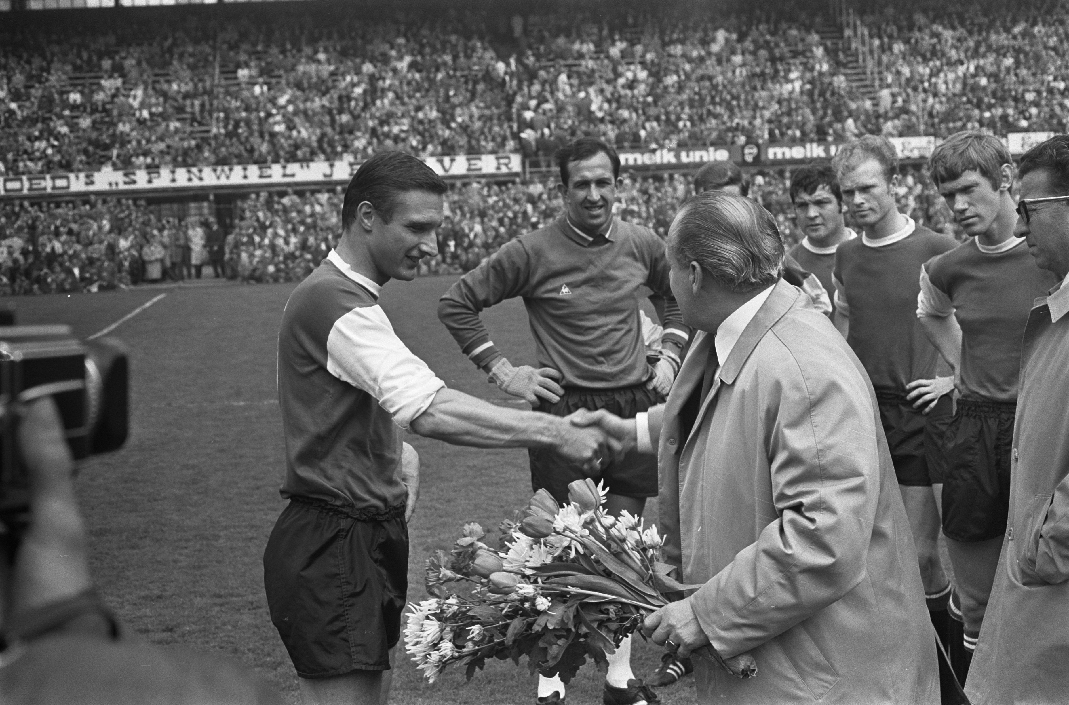 Collectie / Archief : Fotocollectie Anefo Reportage / Serie : [ onbekend ] Beschrijving : Feijenoord tegen Volendam 1-0. Veldhoen wordt gehuldigd door Feijenoord manager Guus Brox Annotatie : Om Brox heen staan (zichtbaar) Eddy Pieters Graafland, Theo Laseroms, Ruud Geeld en Henk Wery Datum : 11 mei 1969 Locatie : Noord-Holland, Volendam Trefwoorden : managers, sport, voetbal Persoonsnaam : Brox, P.G., Veldhoen, Cor Instellingsnaam : Feyenoord Fotograaf : Verhoeff, Bert / Anefo Auteursrechthebbende : Nationaal Archief Materiaalsoort : Negatief (zwart/wit) Nummer archiefinventaris : bekijk toegang 2.24.01.05 Bestanddeelnummer : 922-4036